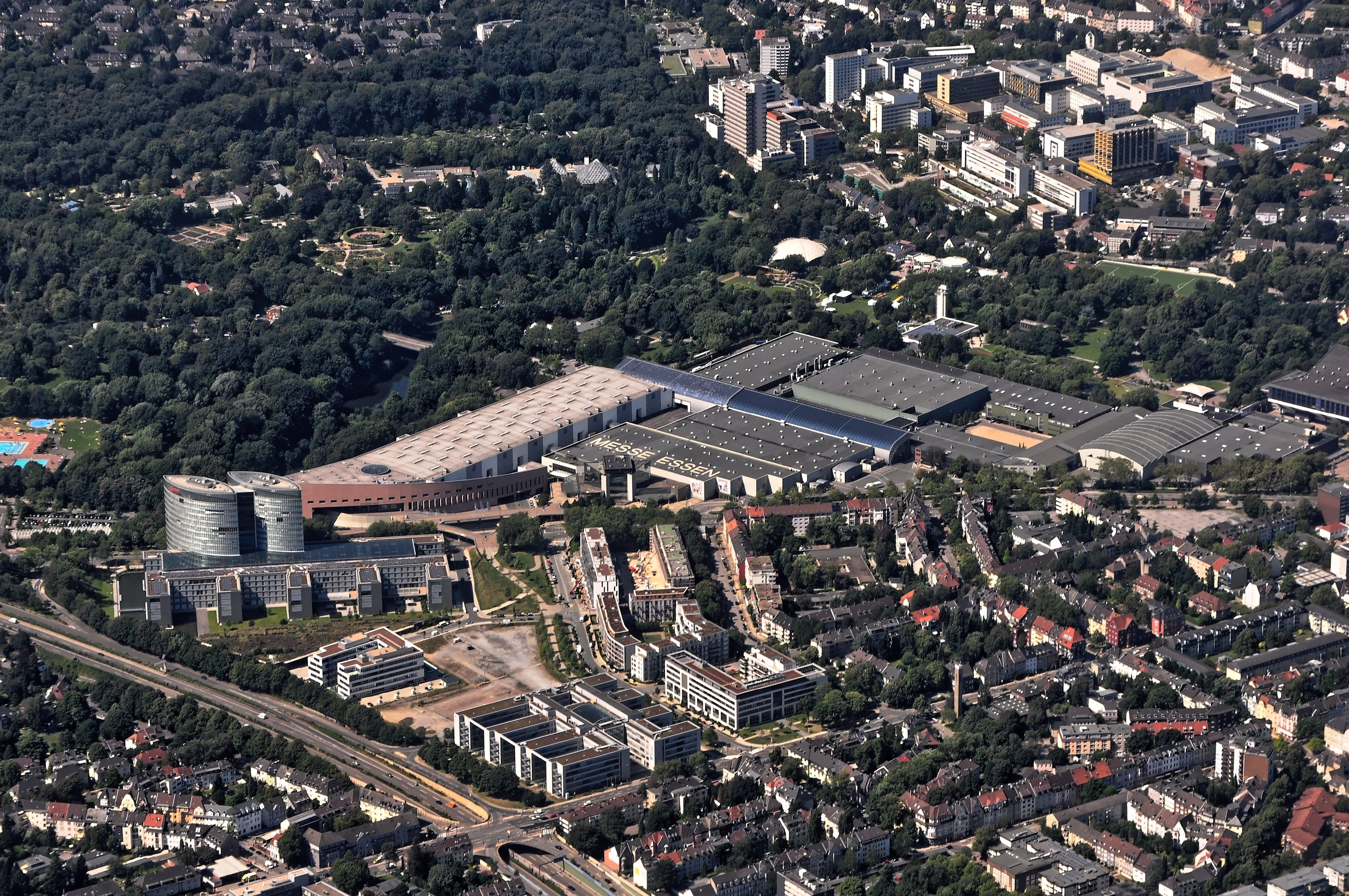 Bilder vom Flug Rom–Düsseldorf–Hamburg 2013: Essen